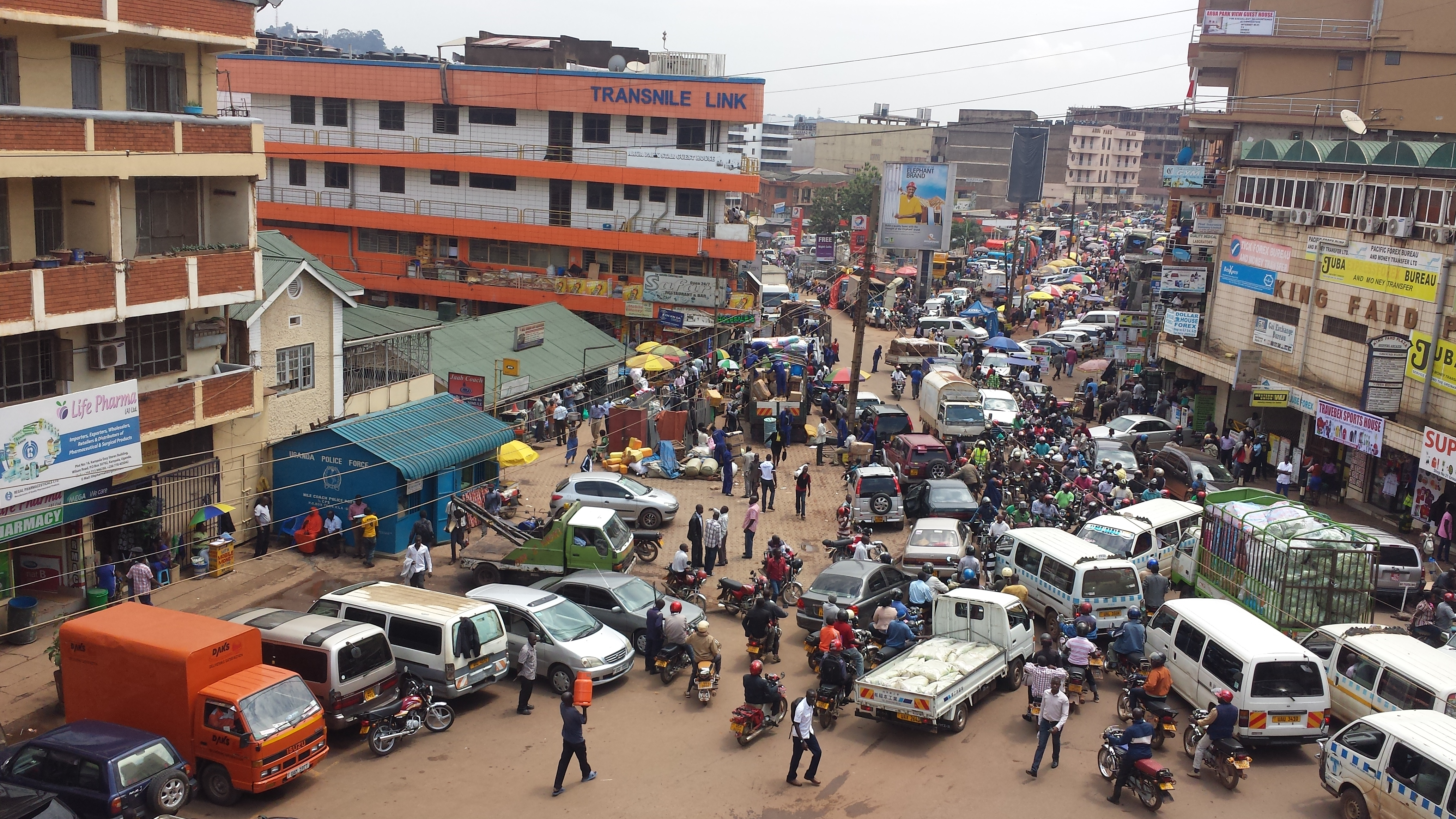 שעות השיא בנתיבי התחבורה בעיר קמפלה